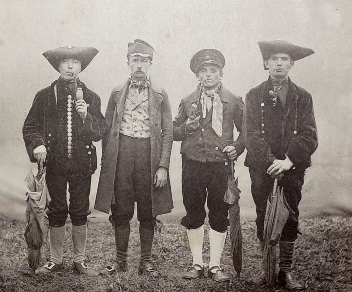 Festtracht Männer aus Leutersdorf (Sachsen) Lichtdruck aus einer Mappe zu sächsischen Volkstrachten und Bauernhäusern von 1897